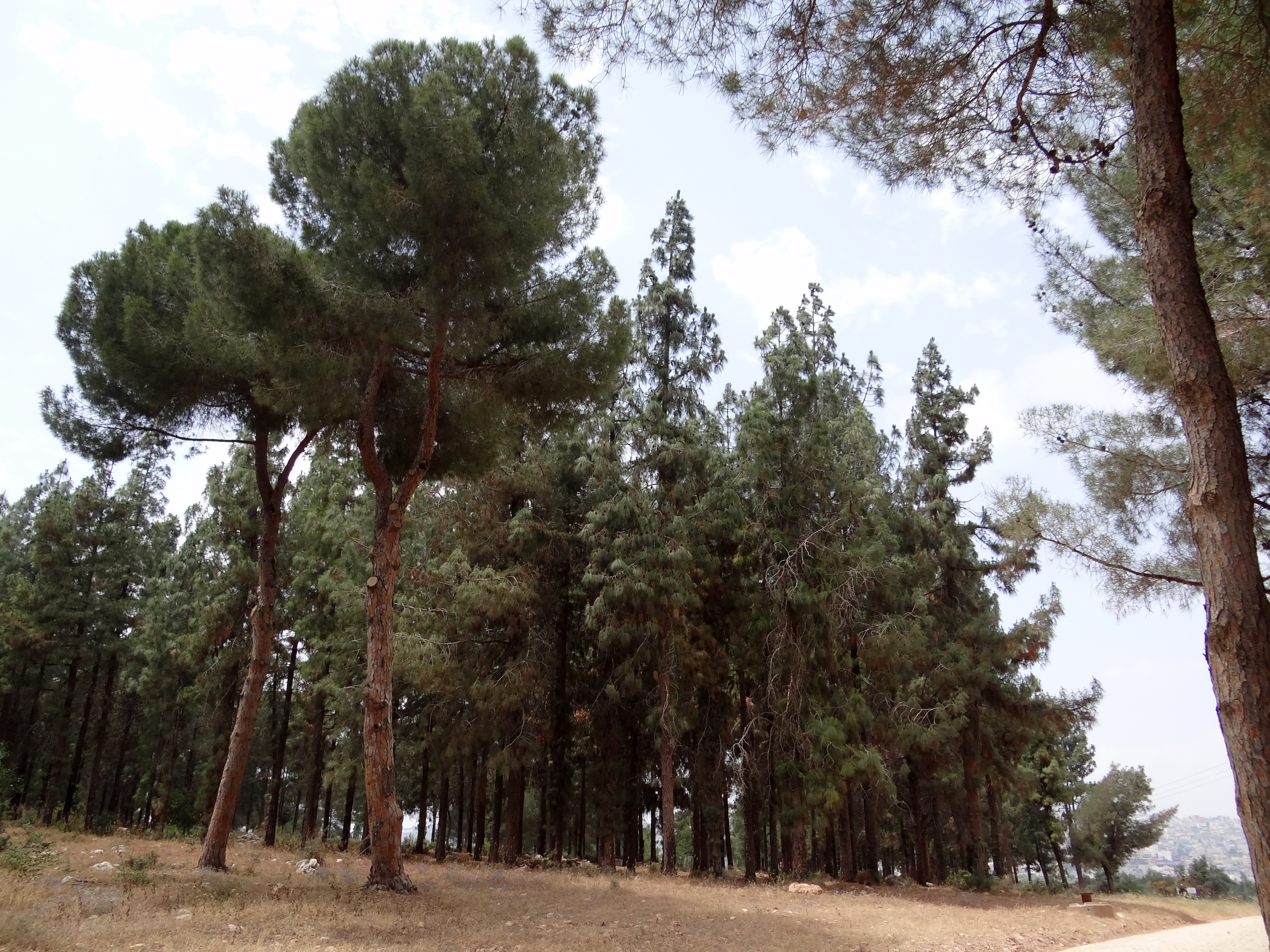 עצי האורן המנדטוריים היא חורשה למרגלות הר דבורה של שרידי עצי אורן הגלעין שניטעו בתקופת המנדט הבריטי בשנות העשרים של המאה העשרים